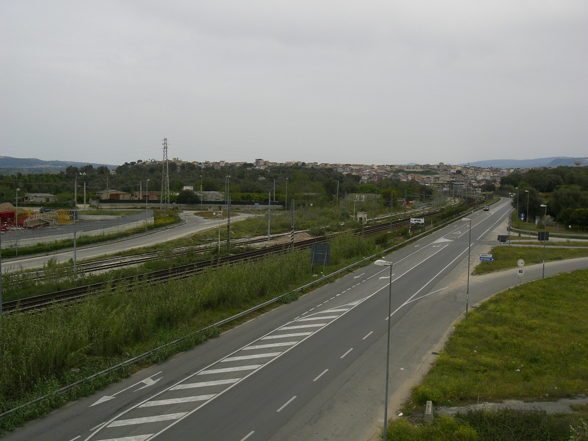 Entrata Rosarno sud